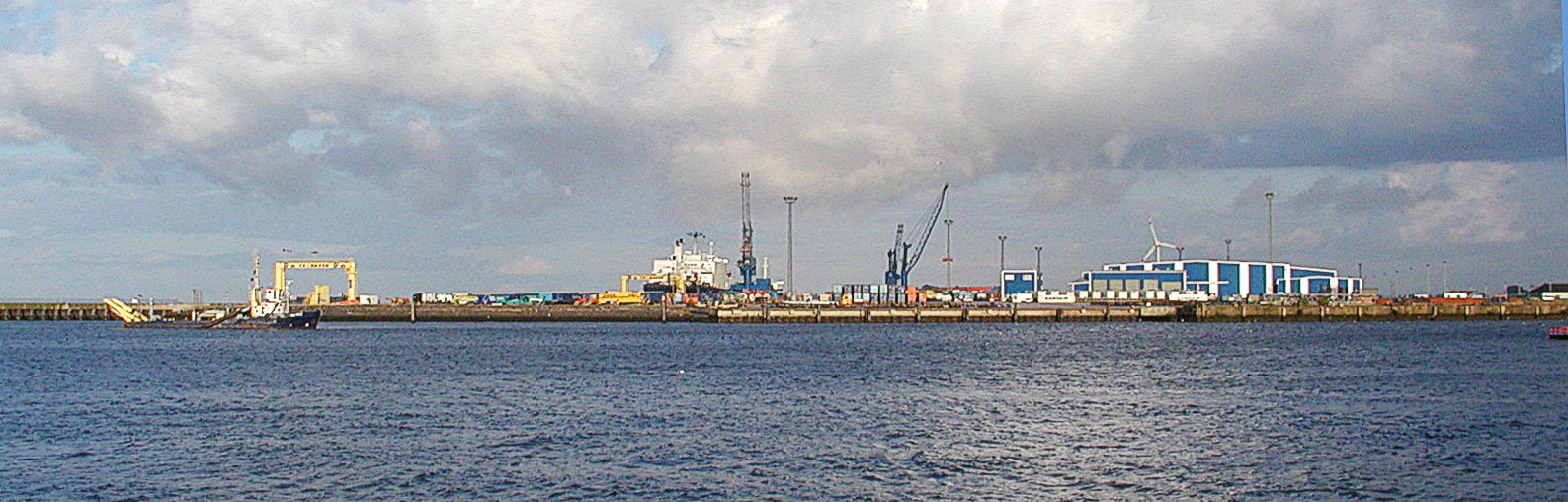 Der neue Hafen Cux-Port